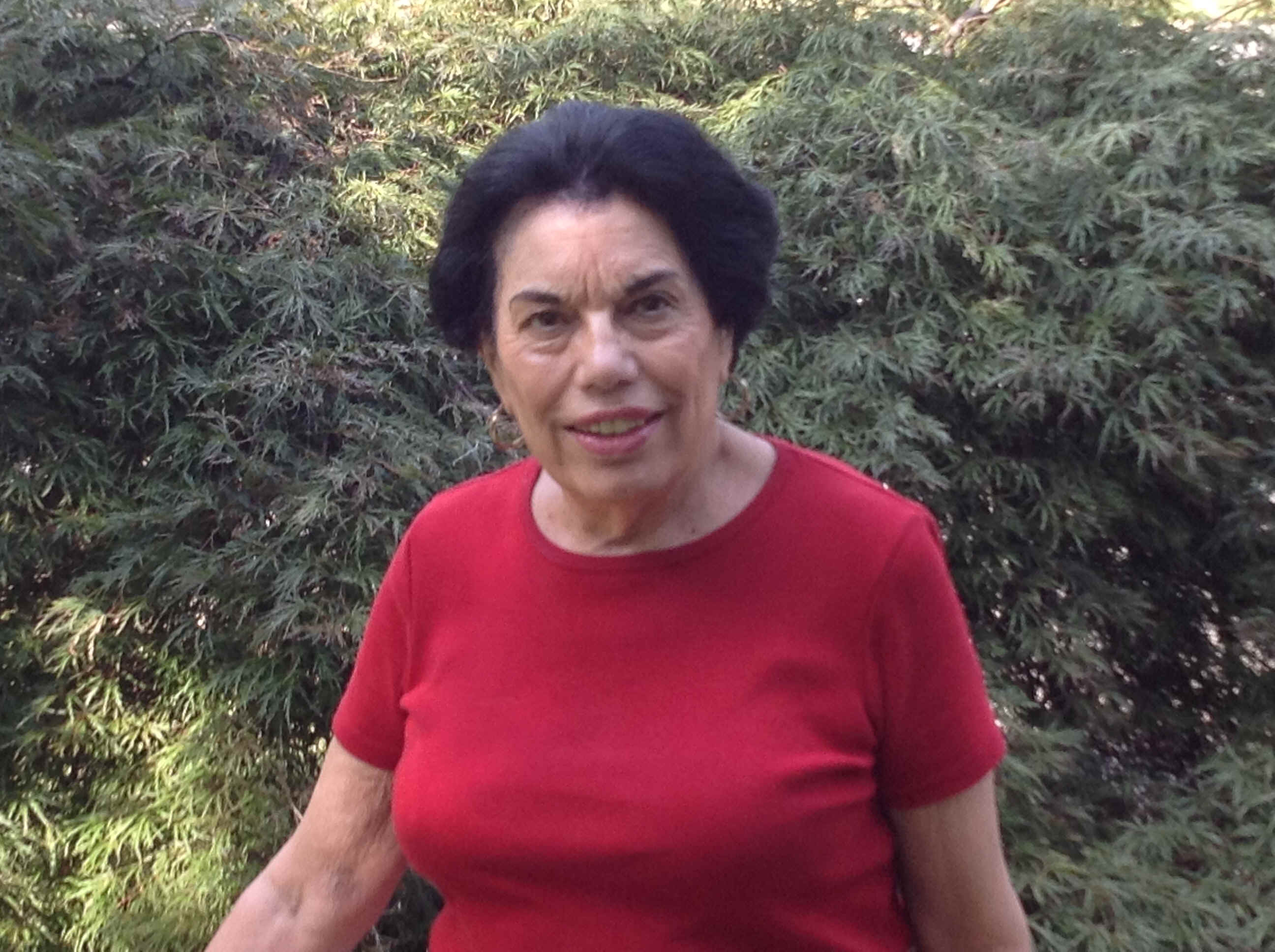 Carmen Delgado Votaw